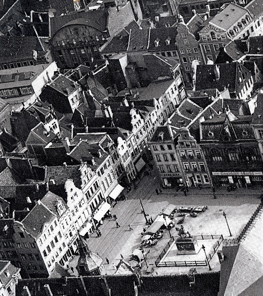 Marktplatz mit Marktstraße, von oben. Marktplatz Häuser: Nr. 12 altes Eckhaus zur Bolkerstraße (Denkmalschutz), Nr. 11 heute teils erhalten, Nr. 10 und 9 abgegangen; am Standort des heutigen Verwaltungsgebäudes Marktplatz 6: Häuser Nr. 8, 7 (Rathaus-Apotheke), 6 abgegangen; so wie auch die Häuser Marktstraße mit ungeraden Nummern